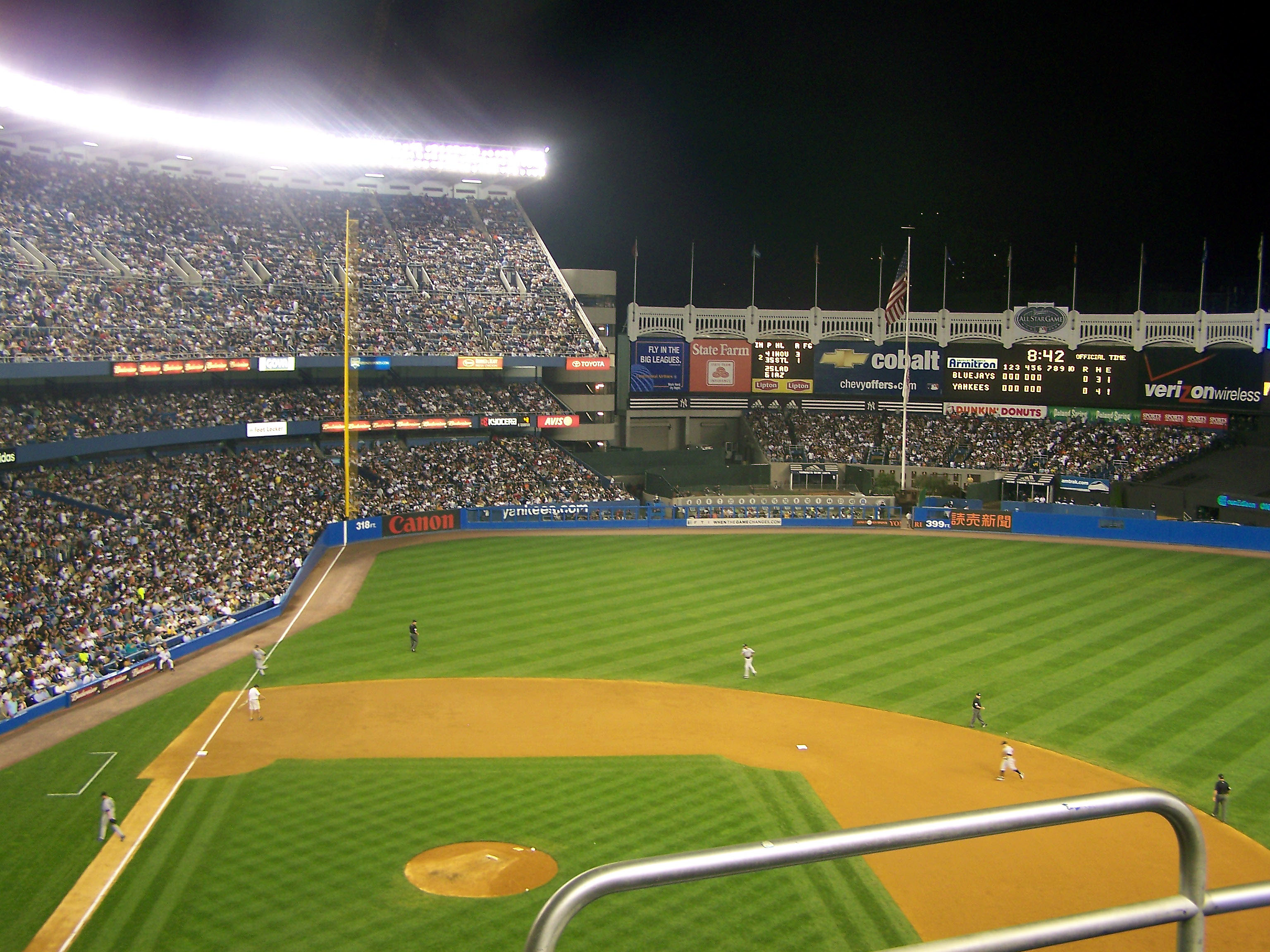 Yankee Stadium 19:13, 29 September 2007 . . KOknockout920 . . 3072×2304 (1.34 MB)